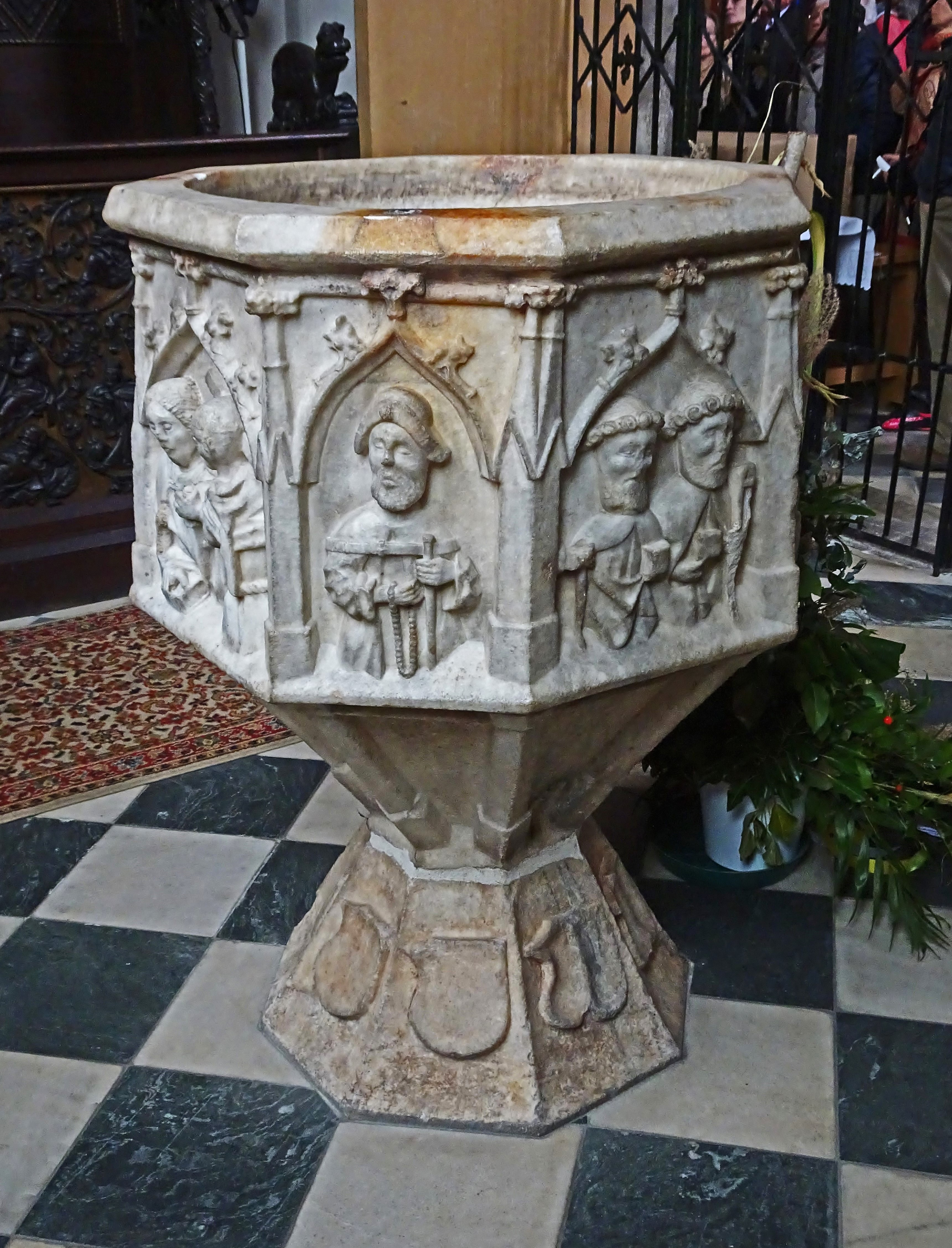 Hauptstadtpfarrkirche St. Jakob d. Ä. (Villach), gotischer Taufstein in der Leiningerkapelle